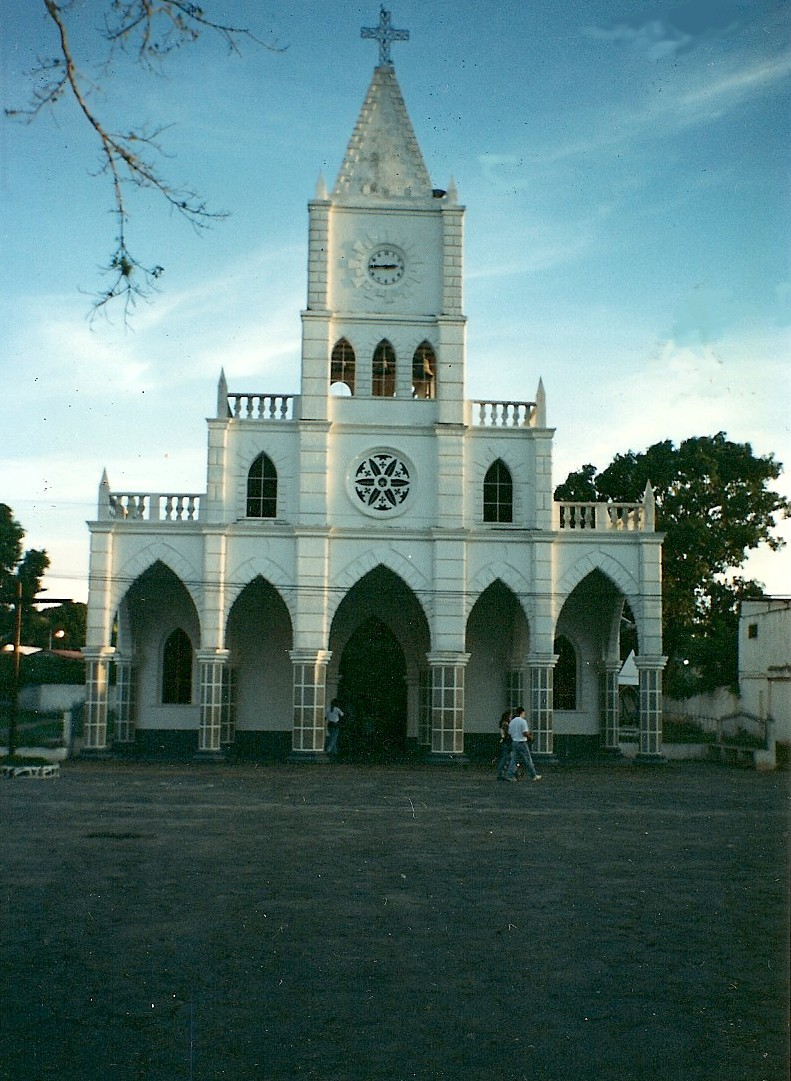 Iglesia de El Callao Estado Bolívar - Venezuela